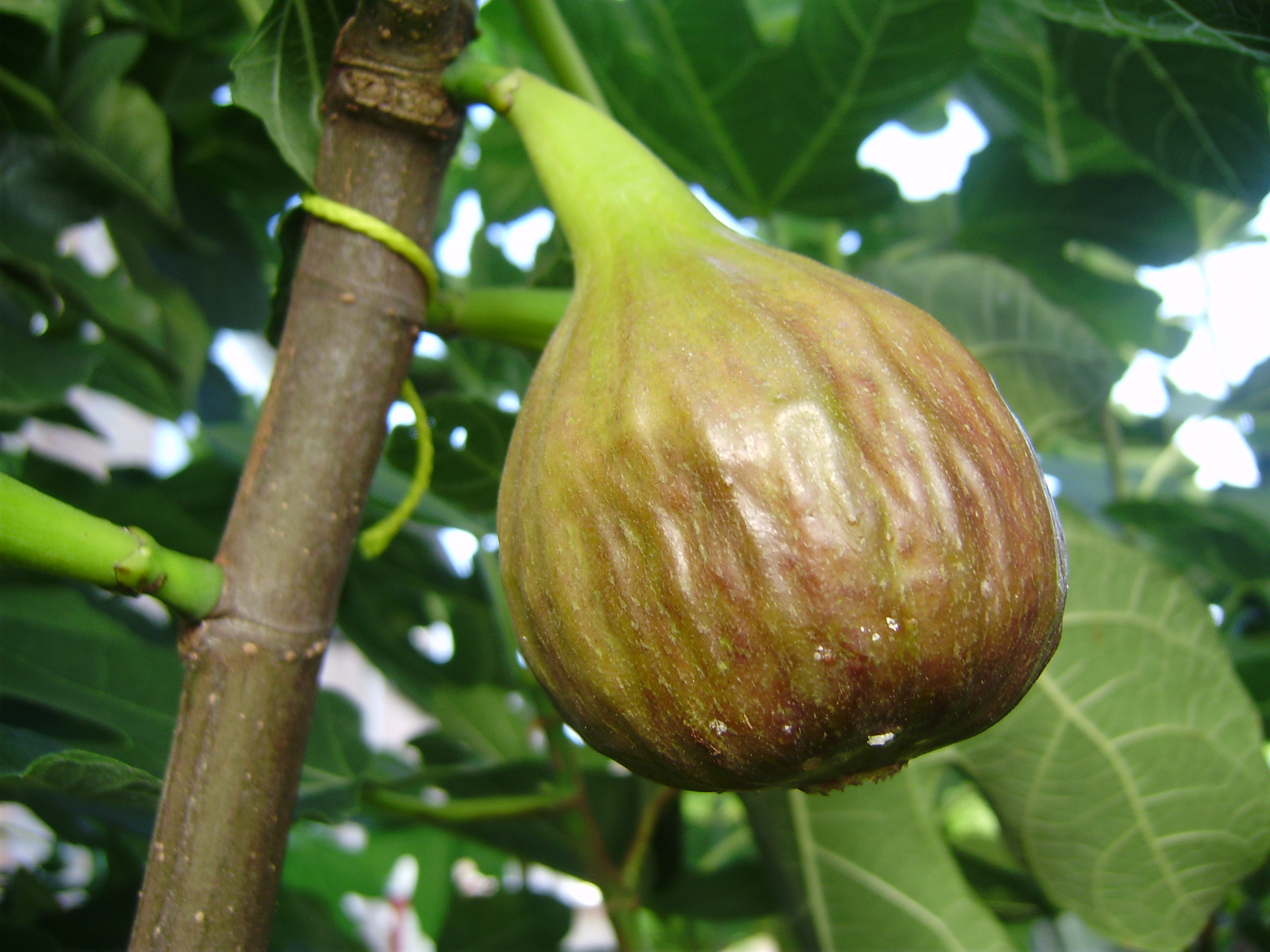 Ficus carica vijg